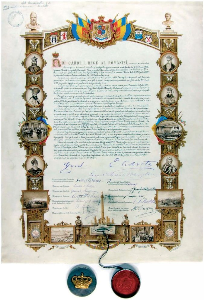 Actul de încoronare a regelui Carol I al României